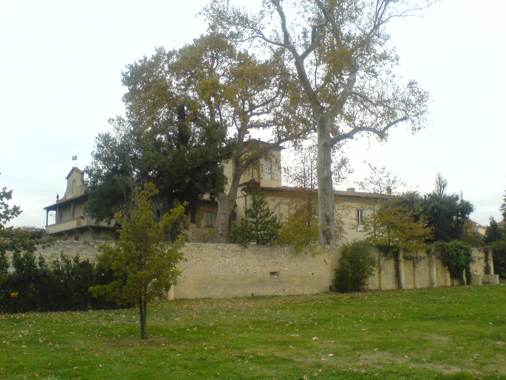 Villa Rucellai a Campi Bisenzio vista dal retro.